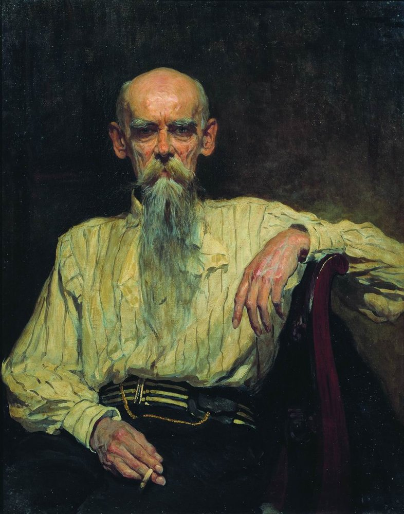 Александр Владимирович Маковский (1869-1924) «Портрет художника Ефима Ефимовича Волкова».